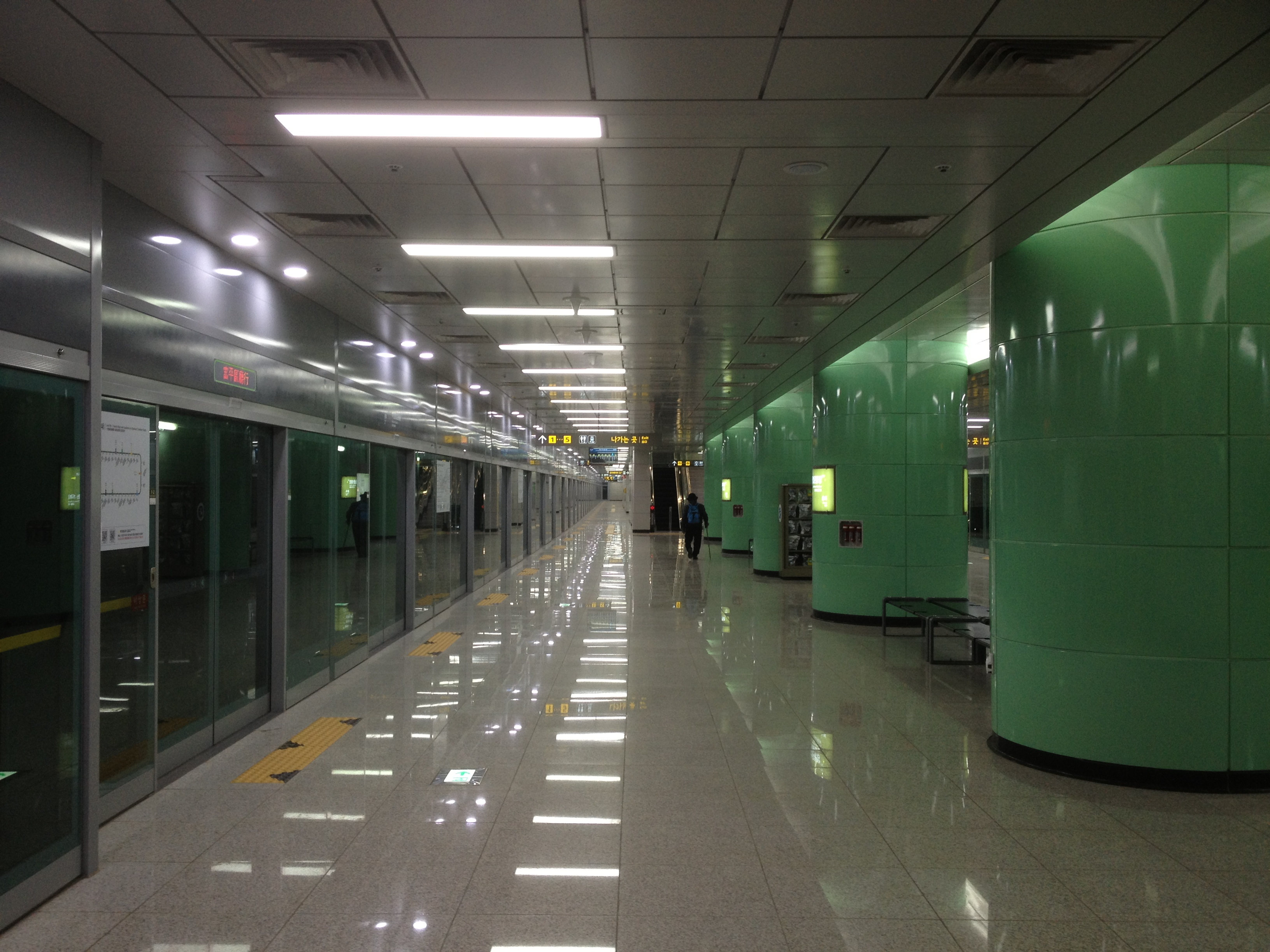 부천종합운동장역 승강장